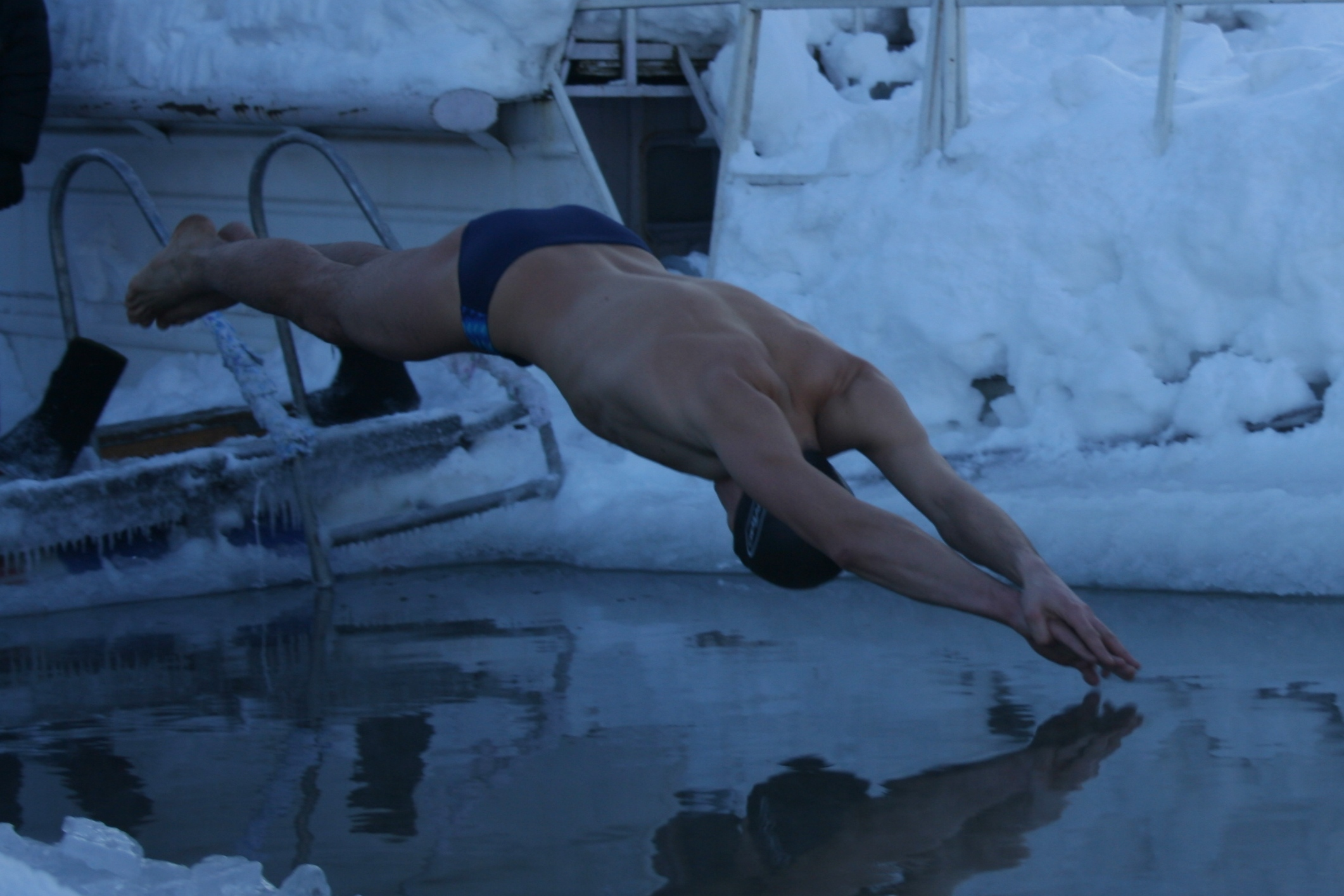 VI Рождественский марафонский заплыв. Дистанция 600 метров. Посёлок Артыбаш, Телецкое озеро, Республика Алтай, Россия.